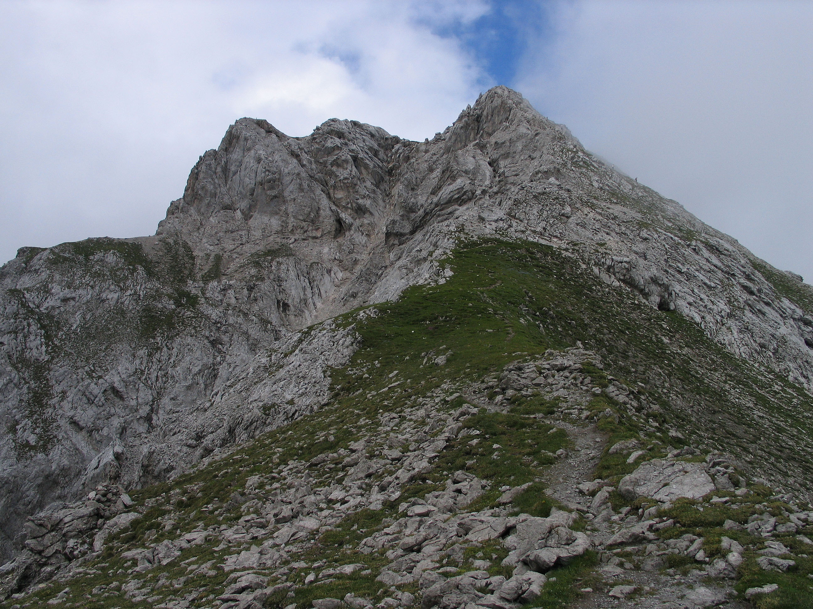 Hinterer Tajakopf (2408 m), Mieminger Kette, tirol